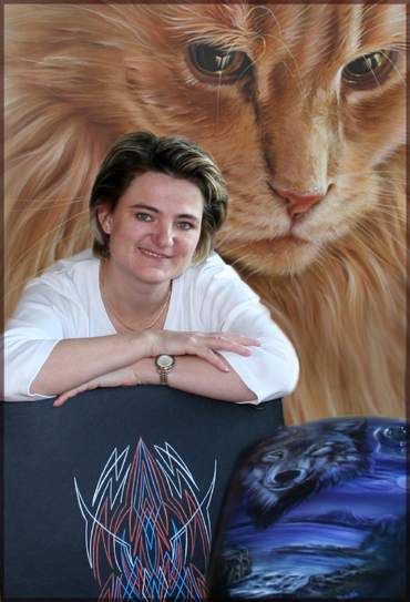 Künstlerin Tatjana Bösl